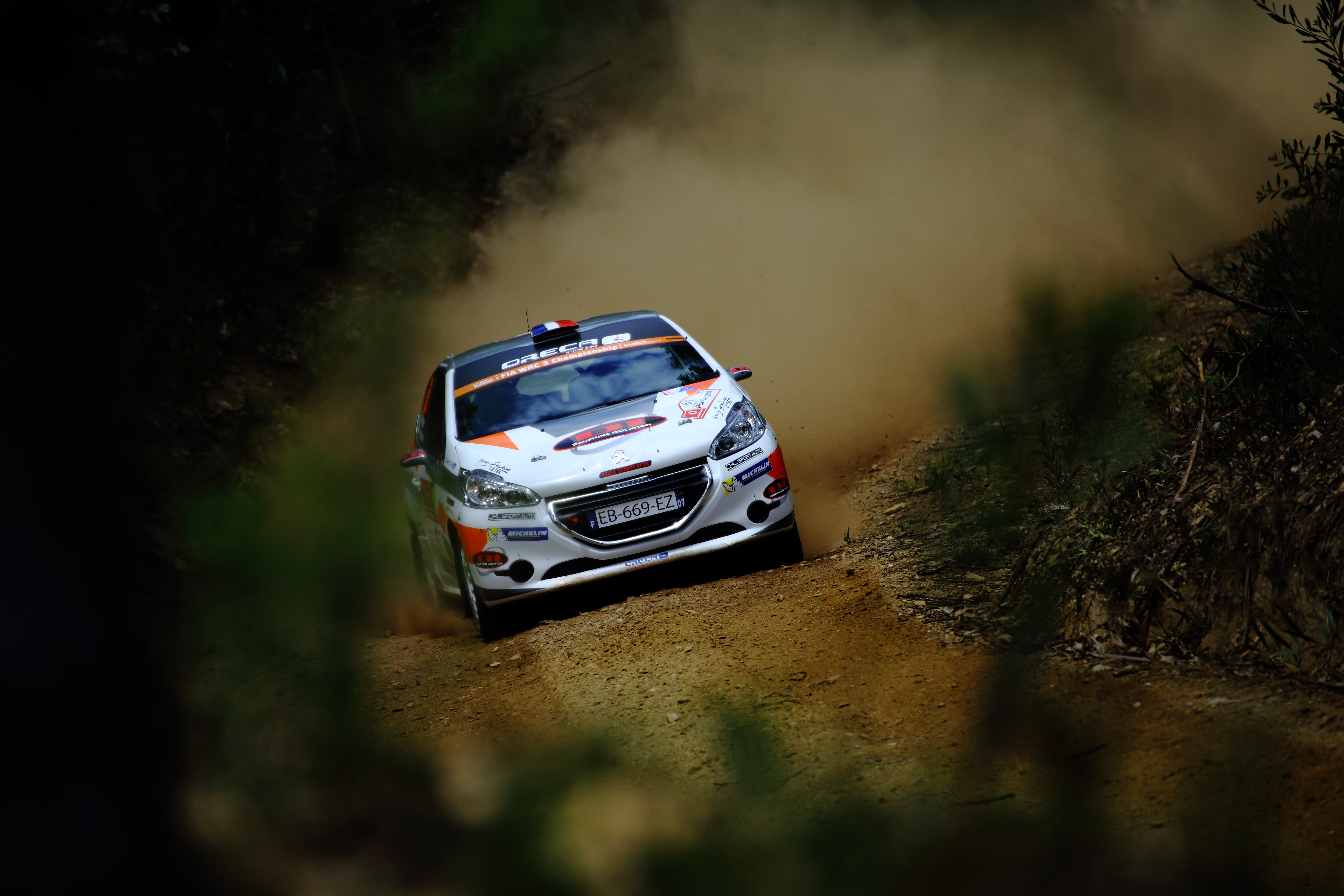 2017 Rally Portugal